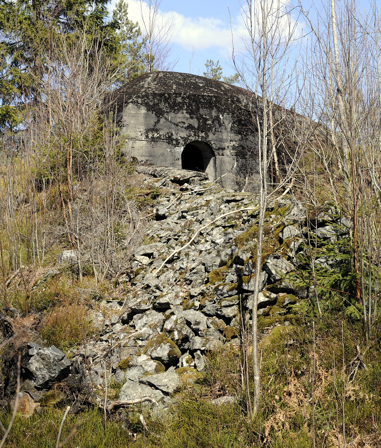 Et av nærforsvarsverkene øst for panserbatteri B